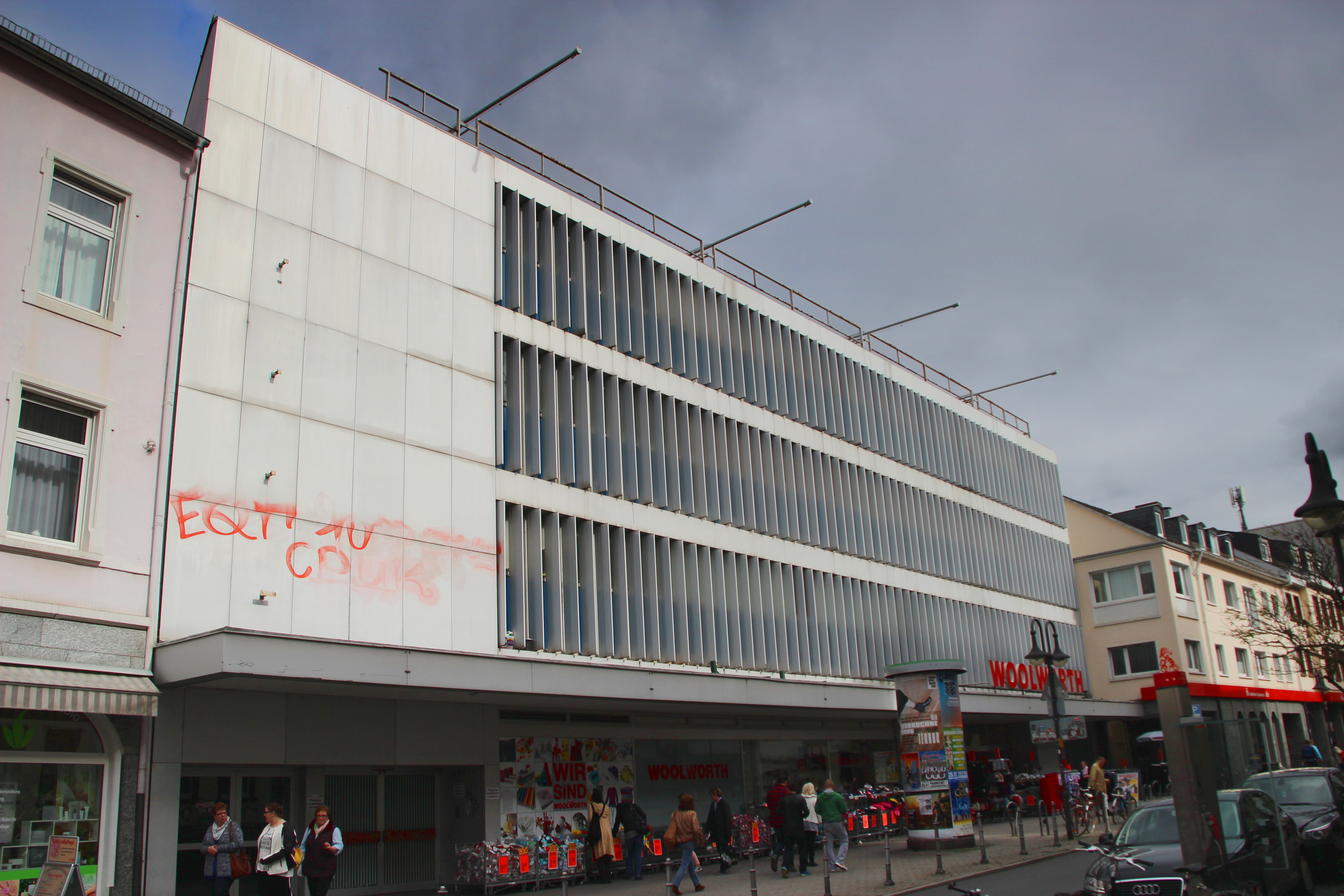 Bildinhalt: Leipziger Straße 88, Woolworth Aufnahmeort: Frankfurt am Main, Deutschland